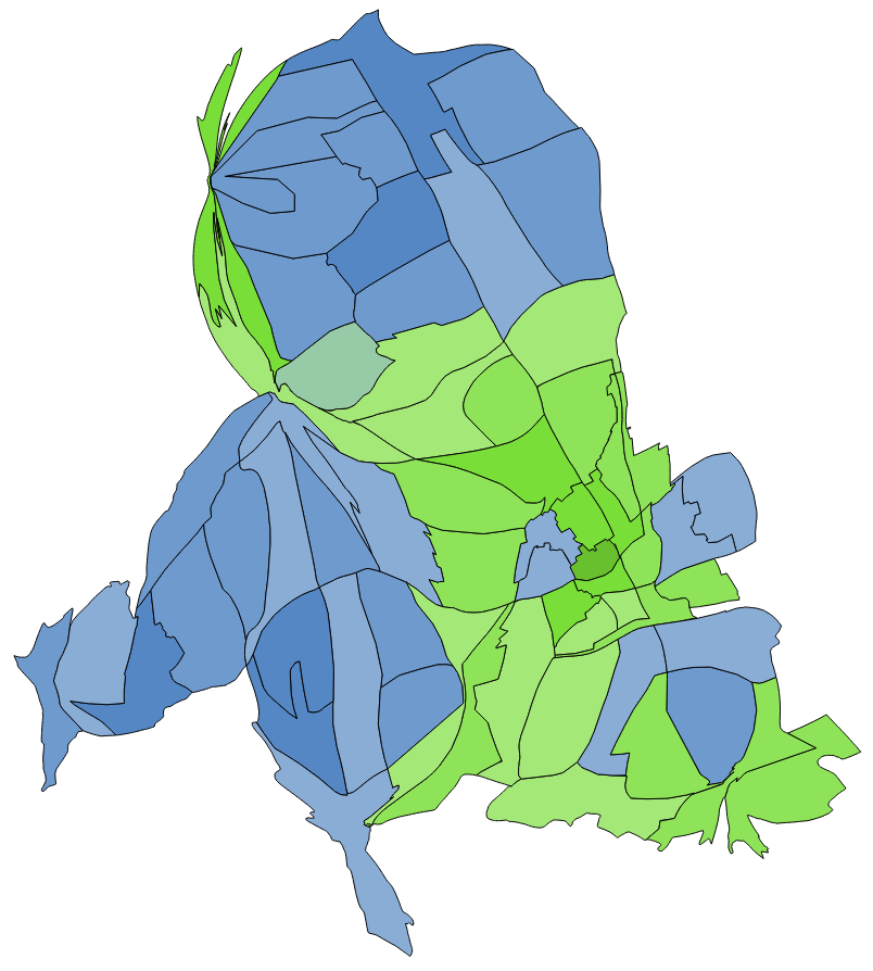 中文（台灣）: 顏色對照表